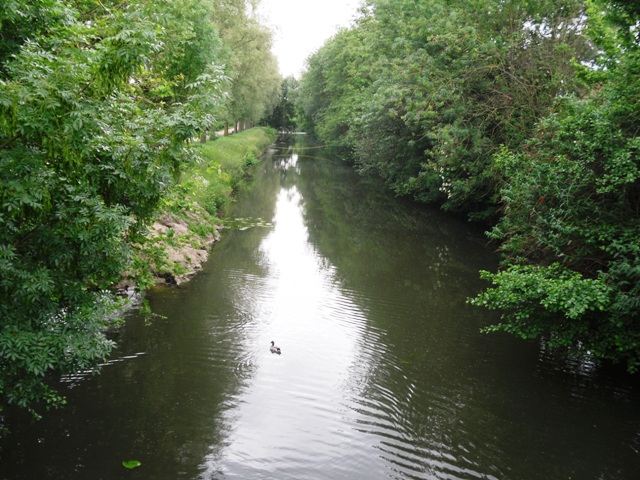 La rivière l'Yerres à Montgeron (91)